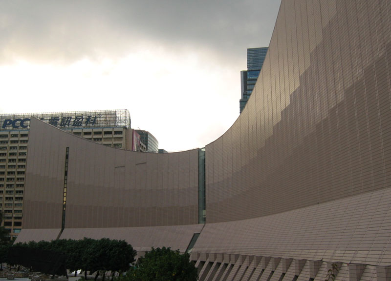 Hong Kong Cultural Centre, TST, Hong Kong